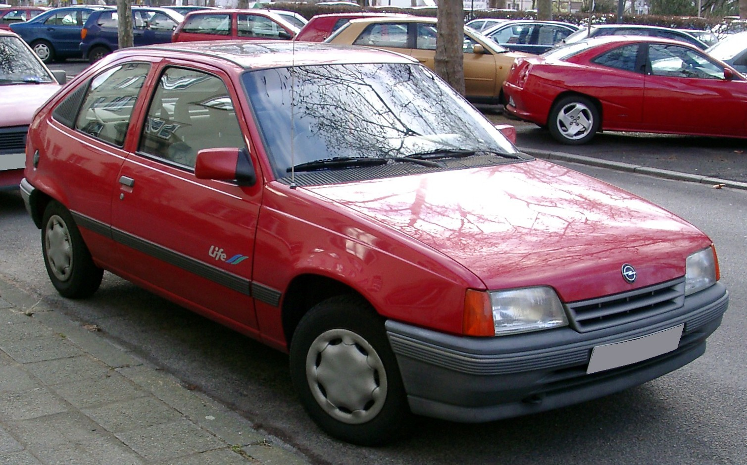 Opel Kadett E Facelift